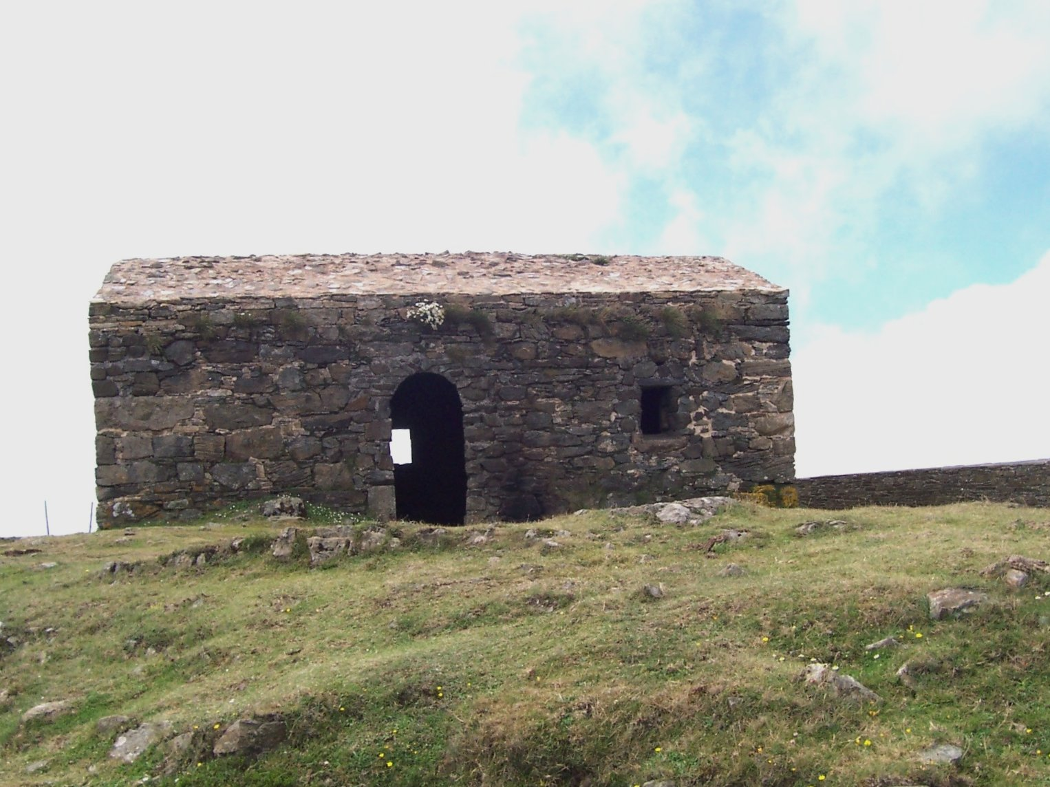 Garita de Herbeira. El mirador de la garita de Herbeira se encuentra en entorno forestal, pleno centro de la Sierra de A Capelada, marca el límite con el municipio de Cariño. Desde el mirador se pueden observar los acantilados más elevados de Europa, con una caída vertical sobre el nivel del mar de 613 metros y una pendiente superior al 80%. Colosal y espectacular panorámica; la sierra de A Capelada desciende directamente desde la garita de Herbeira hasta las aguas del océano atlántico, en una sucesión de acantilados que se abren al intenso oleaje. Es muy frecuente observar caballos en estado salvaje en la carretera que atraviesa la Sierra . Visita obligada e inolvidable.